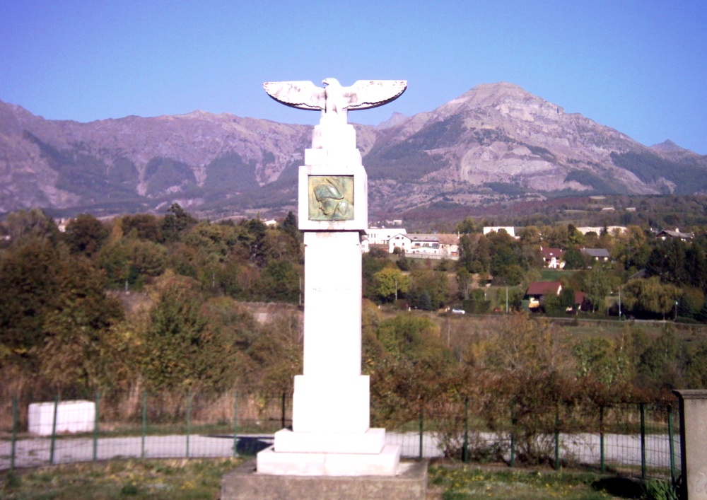 Monument rappelant la halte de Napoléon au pied de Saint-Bonnet